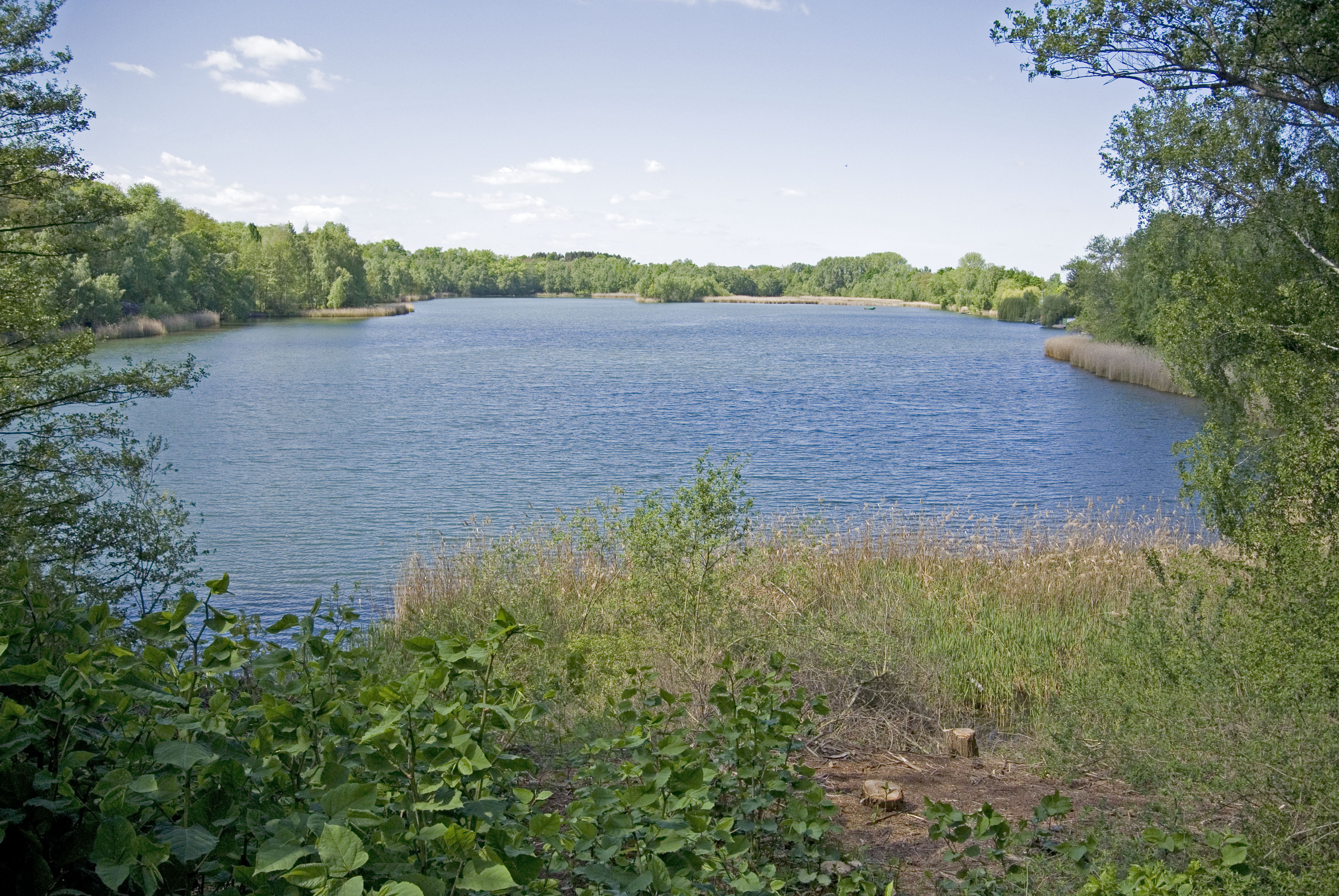 NSG Hainbergsee Meuselwitz (ID 321319}: Hainbergsee bei Meuselwitz im Landkreis Altenburger Land, Thüringen, ca. 18ha, Tiefe: 40m, Inselbiotop spendet wegen reichem Fischbestand Lebensraum für Reiher, Schwäne, Wildgänse